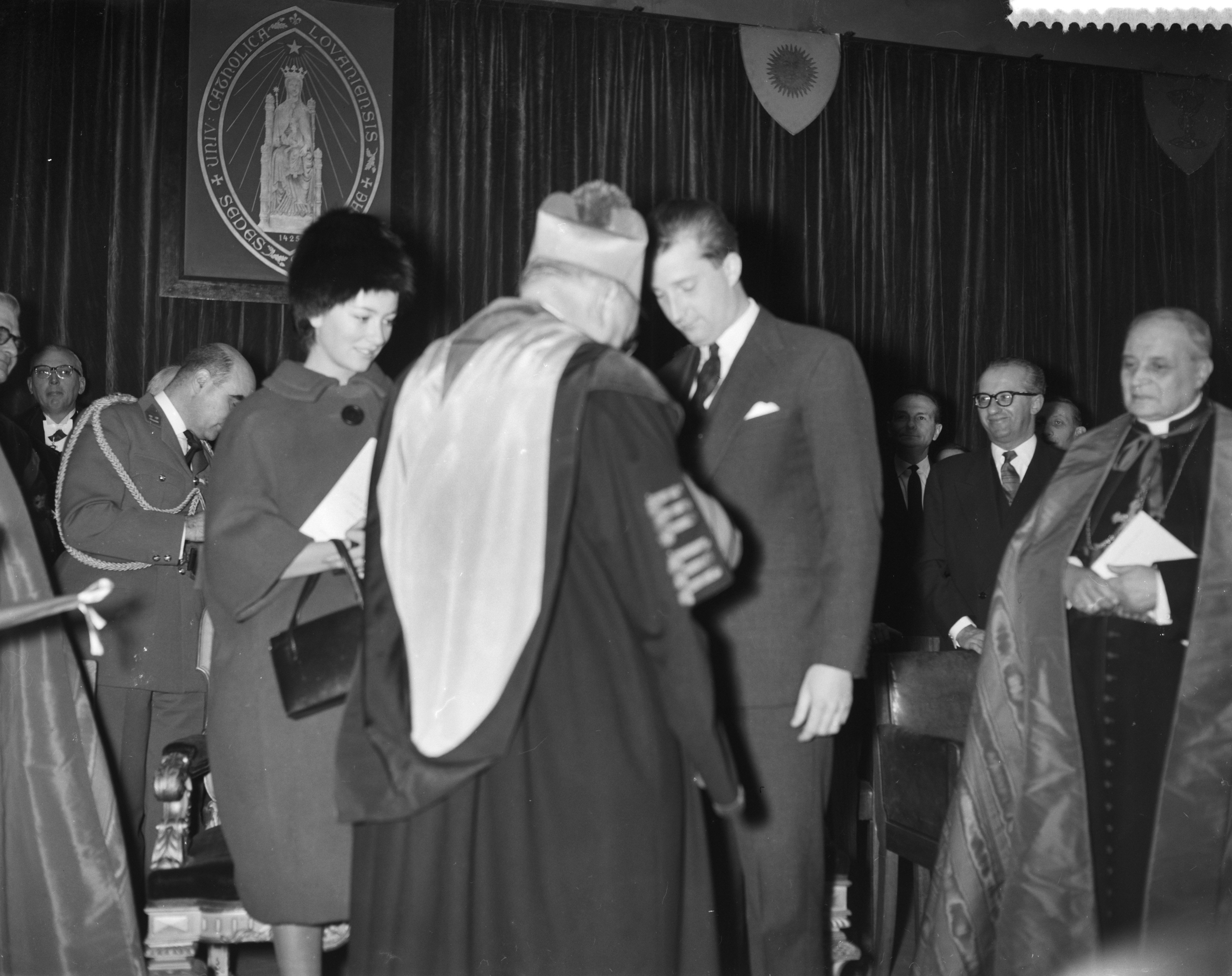 Collectie / Archief : Fotocollectie Anefo Reportage / Serie : [ onbekend ] Beschrijving : Erepromoties verleend door de Universit van Leuven, Prins Albert van Luik Datum : 2 februari 1961 Locatie : Leuven Trefwoorden : EREPROMOTIES Persoonsnaam : ALBERT PRINS Fotograaf : Bilsen, Joop van / Anefo Auteursrechthebbende : Nationaal Archief Materiaalsoort : Negatief (zwart/wit) Nummer archiefinventaris : bekijk toegang 2.24.01.04 Bestanddeelnummer : 912-0449